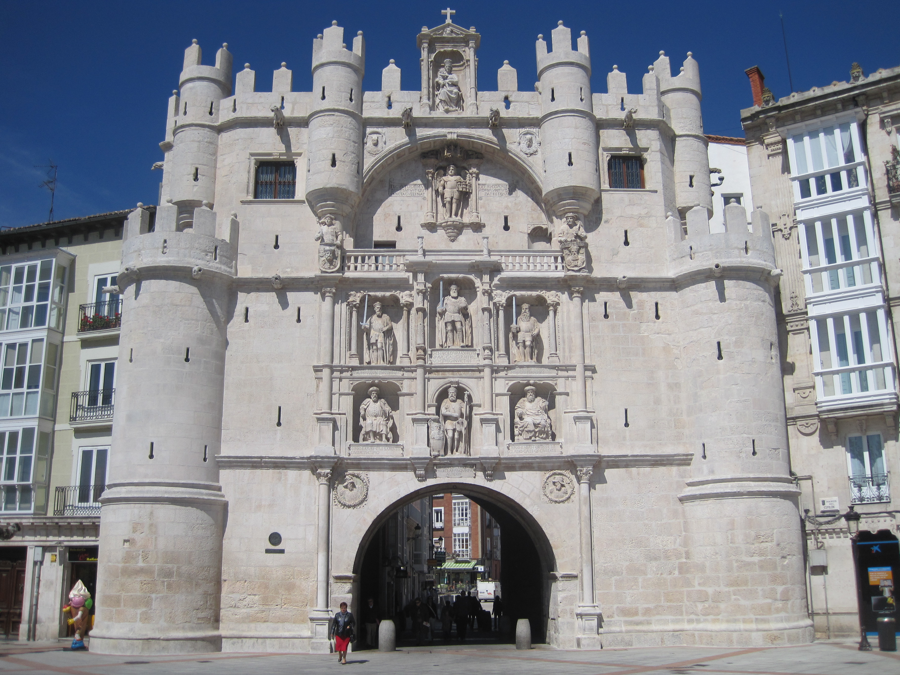 Vista frontal del Arco de Santa María en Burgos, restaurado recientemente.